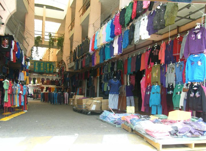 Ropa 34 Uriangato